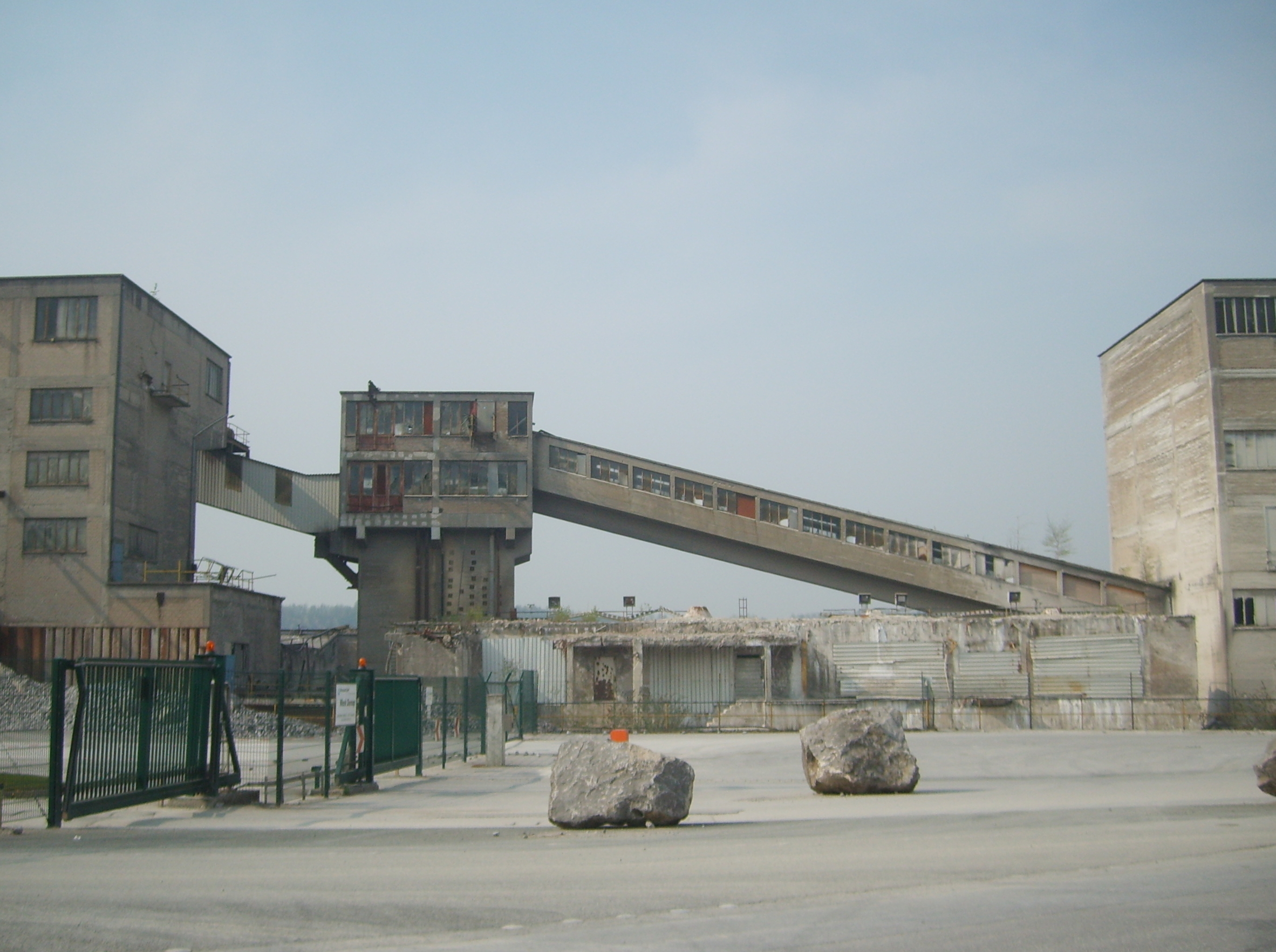 Wuppertal-Dornap, Rheinkalk AG